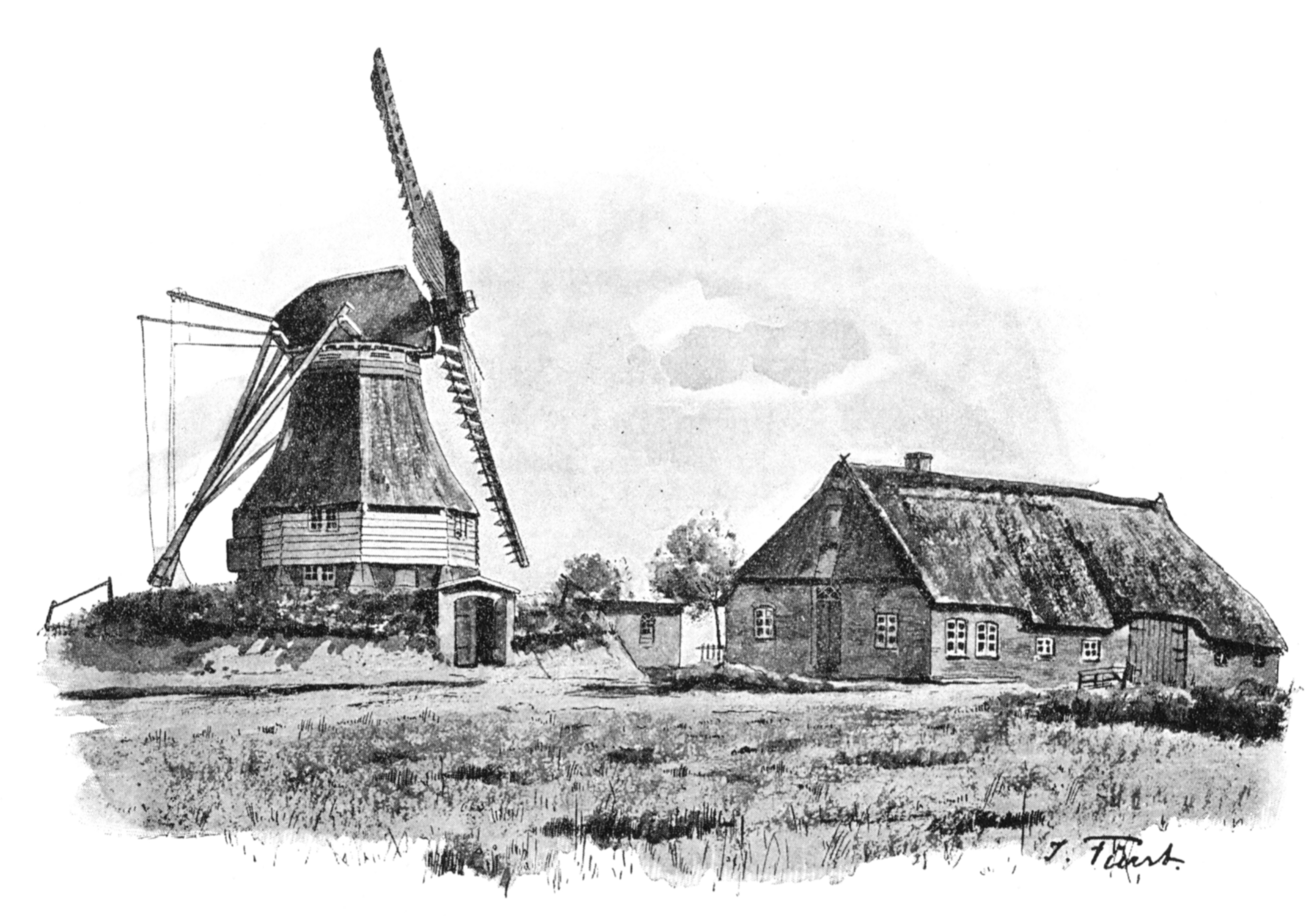 Das Geburtshaus von Claus Harms in Fahrstedt (Diekhusen-Fahrstedt), Zeichnung von Julius Fürst um 1895